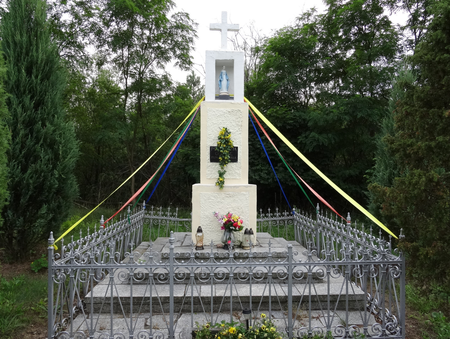 Przyłubie, gmina Solec Kujawski, powiat bydgoski